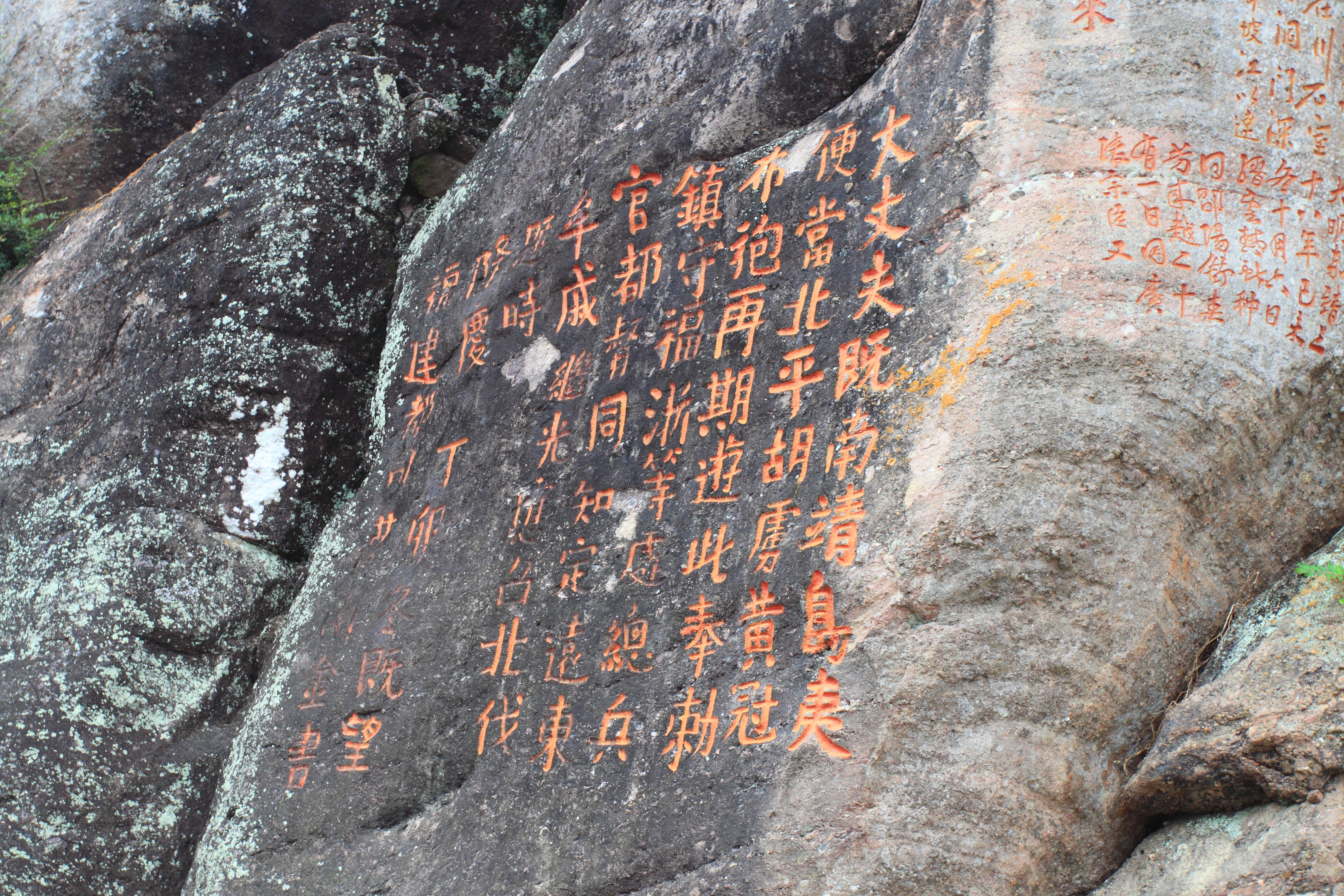 水光岩摩崖石刻